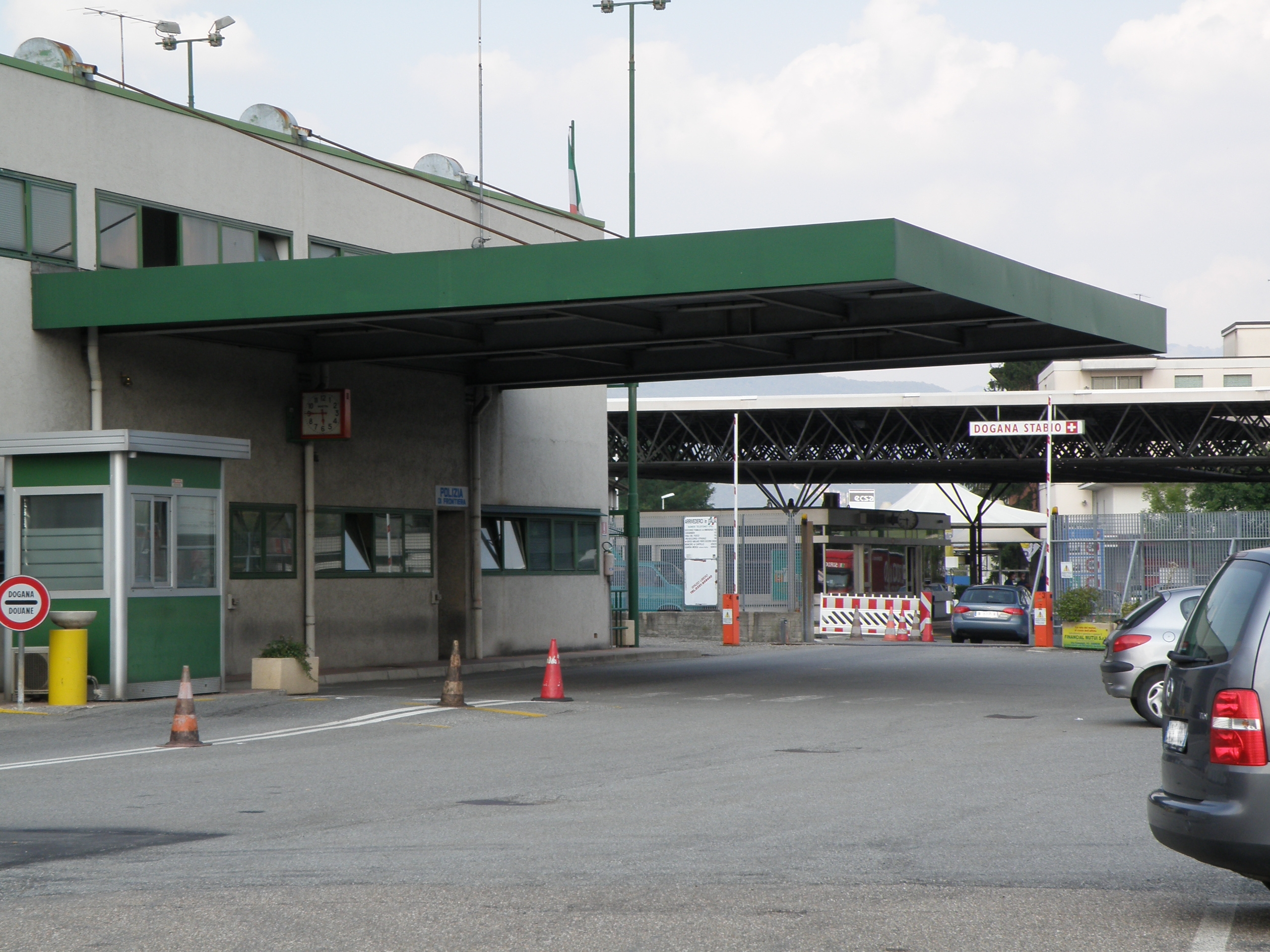 Dogana turistica Gaggiolo - Confine di stato tra Italia e Svizzera